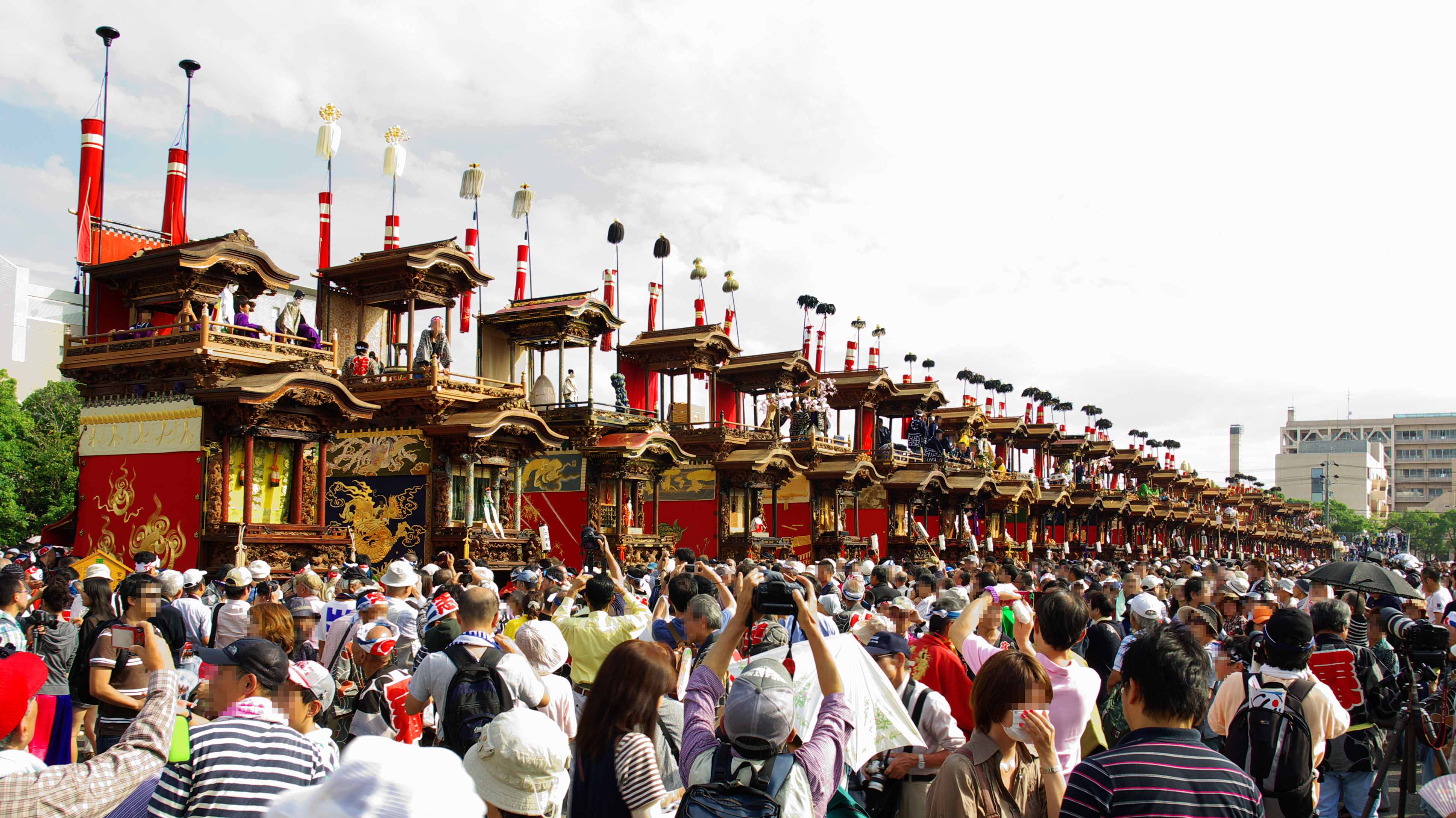 2012年はんだ山車まつりで勢ぞろいした山車群。亀崎東組側から